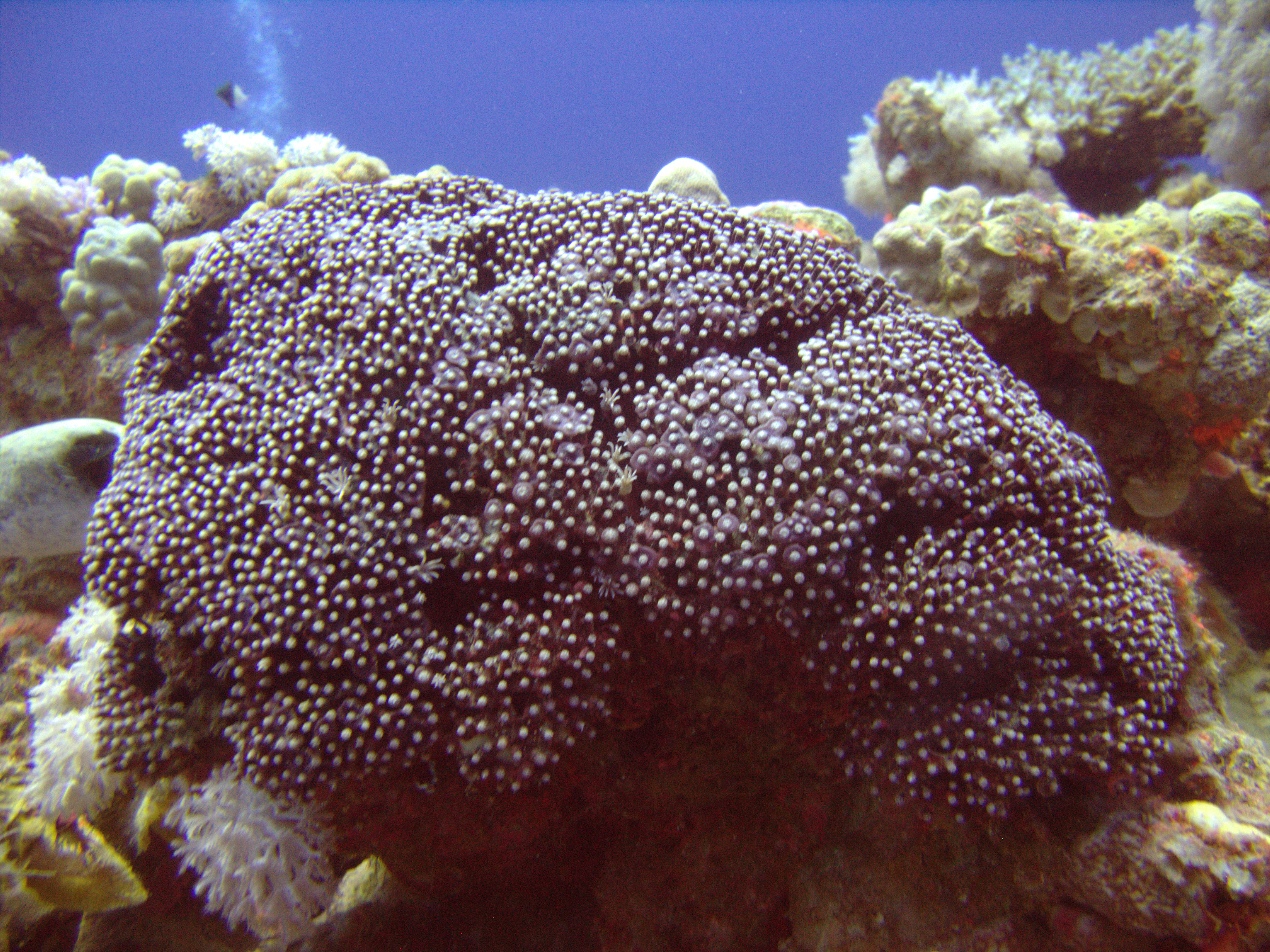 Tubipora musica (probablemente), con la casi totalidad de los pólipos retraídos, en Dhahab, Janub Sina', Egipto, 2013